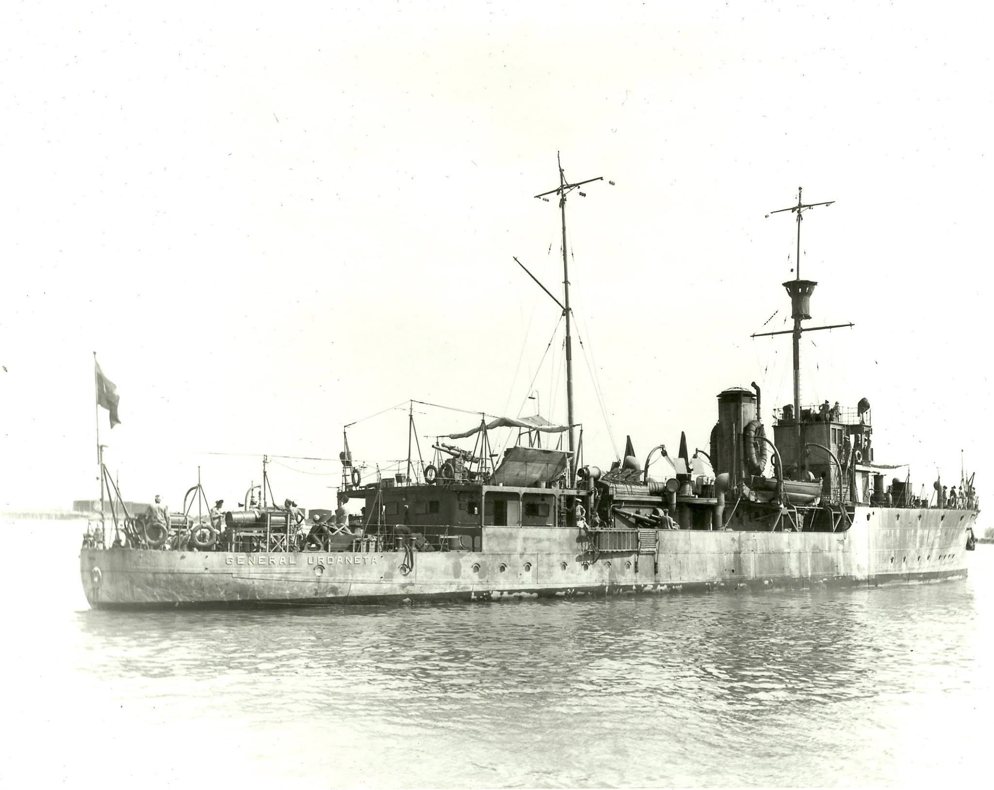 El cañonero “General Urdaneta” durante su repotencición en Galveston, Estados Unidos, junio de 1943